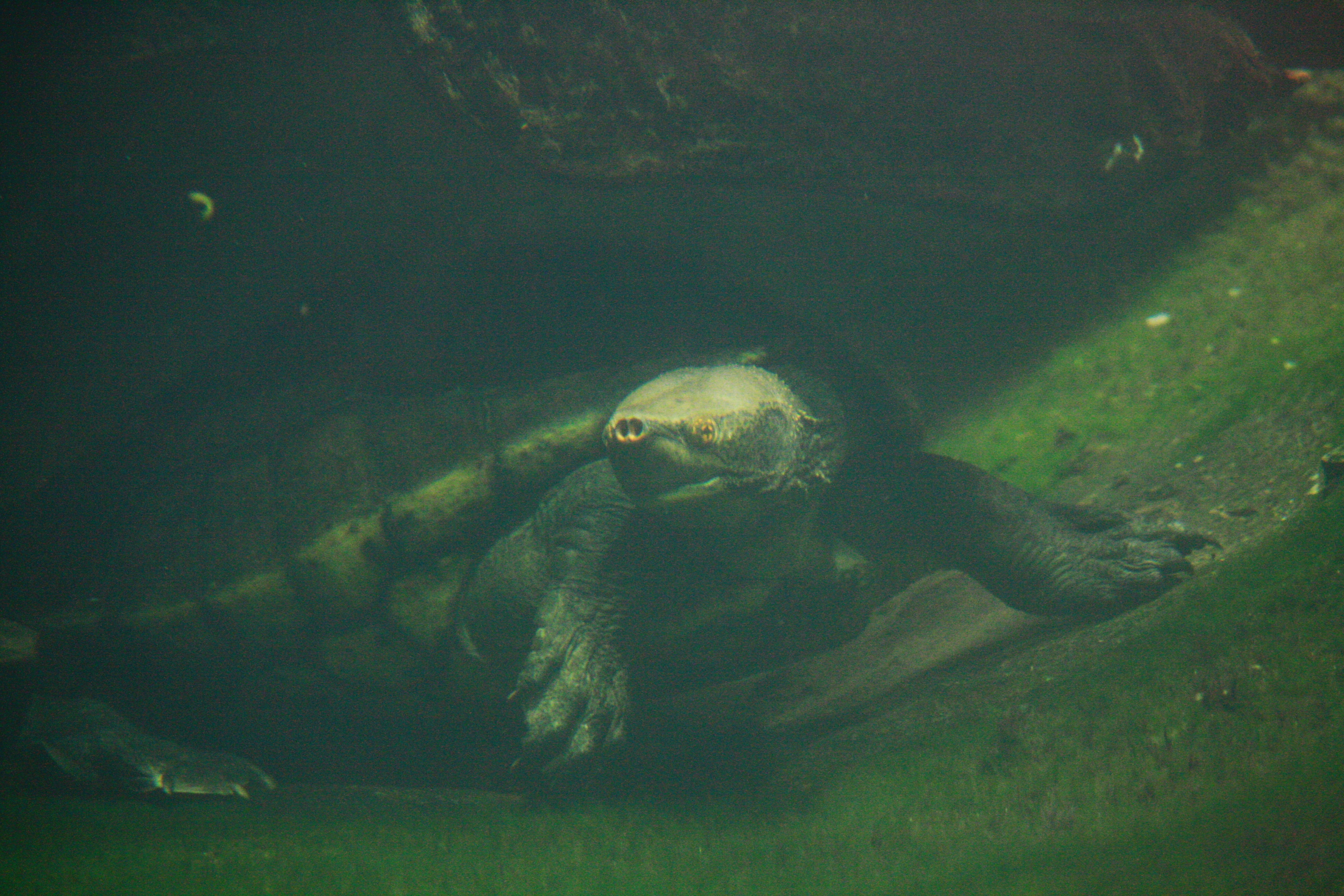 Zoo Praha